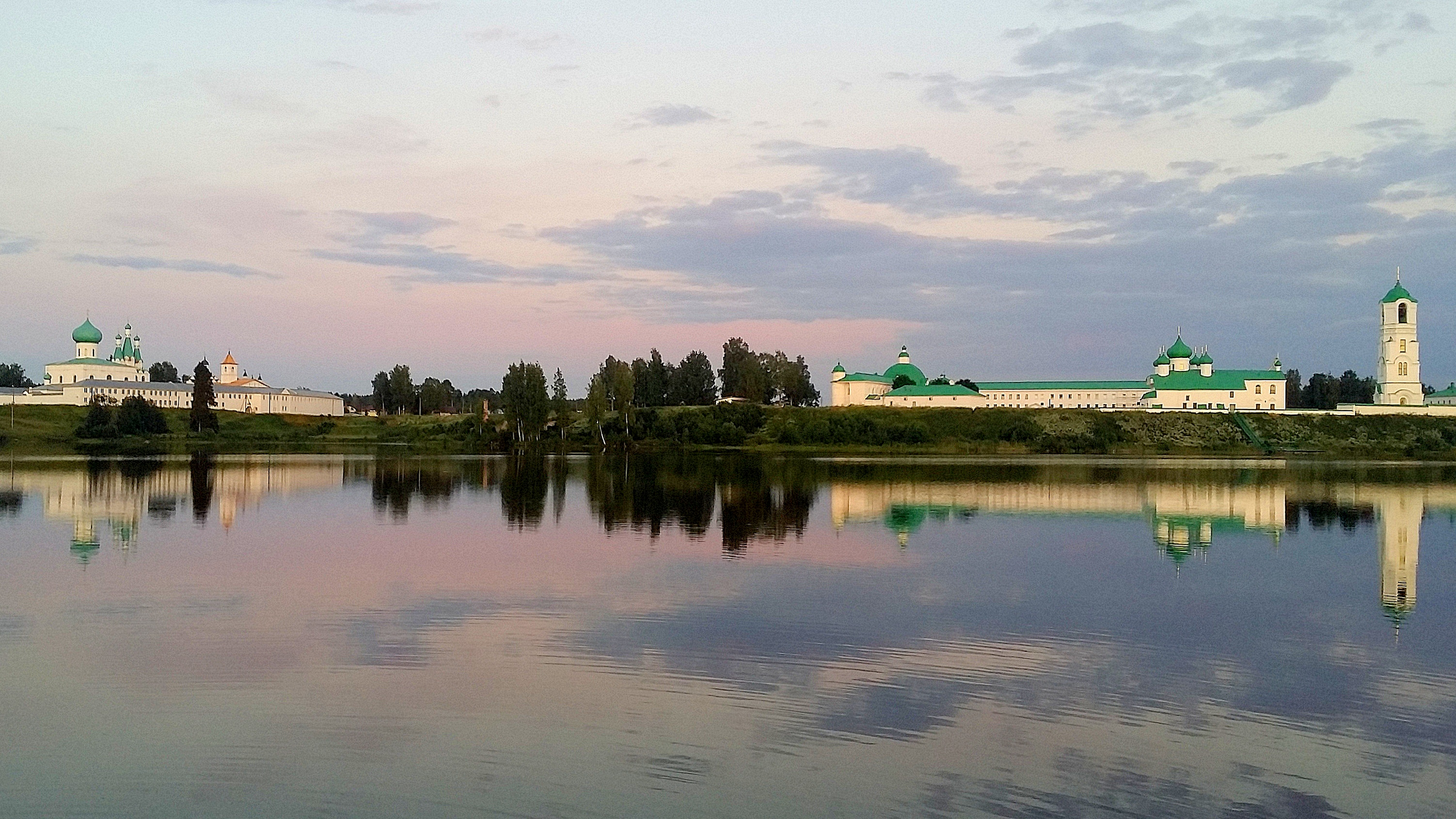 Монастырь Александро-Свирский (комплекс Троицкого и Преображенского монастырей): Старая Слобода, Лодейнопольский район, Ленинградская область